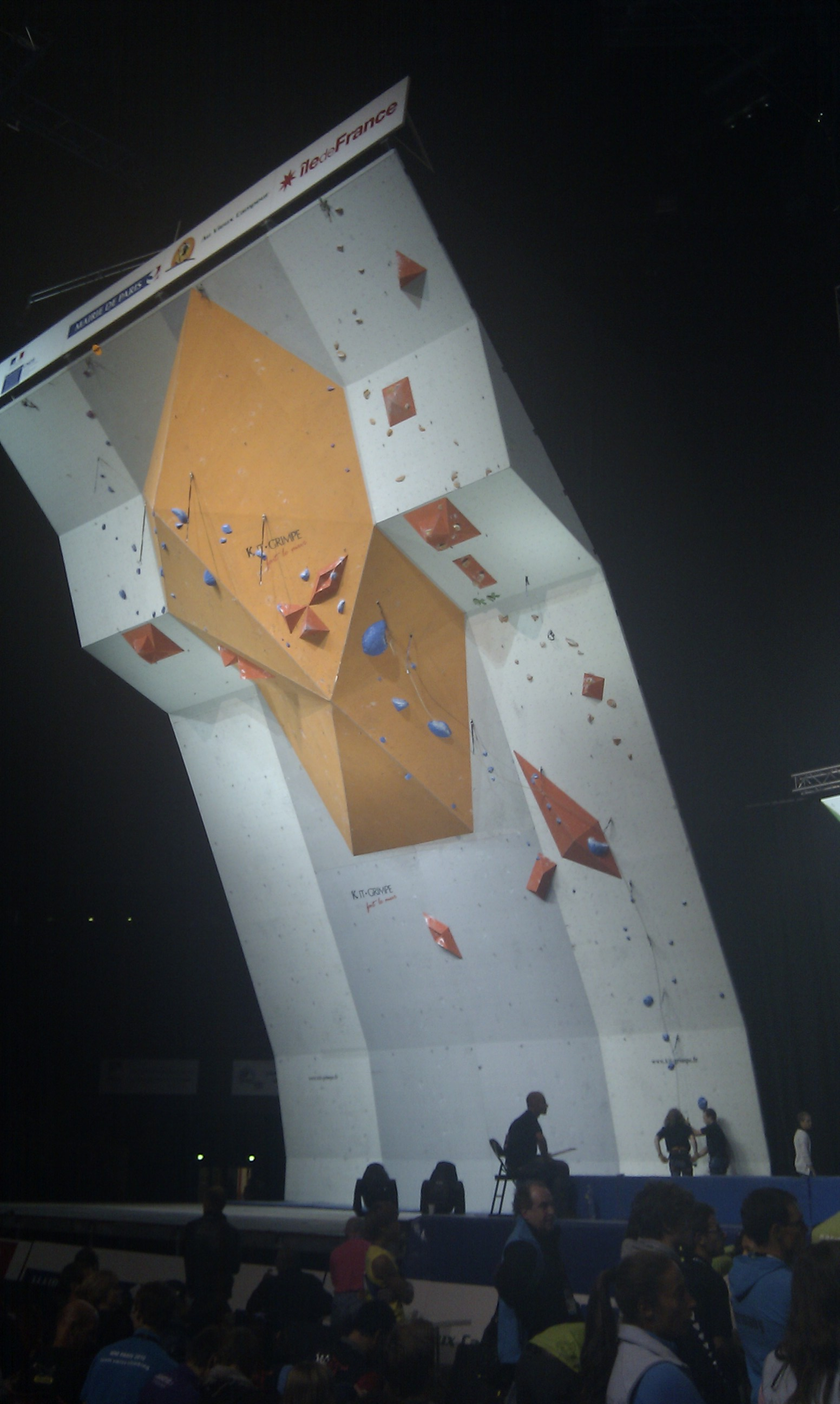 Grimpeuse lors des championnats du monde 2012 à Paris Bercy durant la demi-finale de l'épreuve de difficulté.